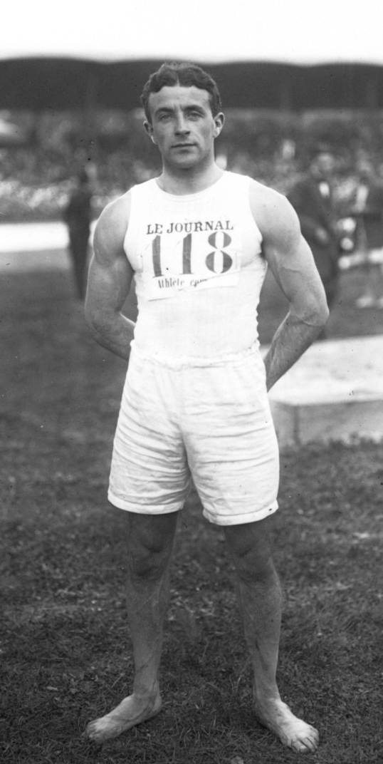 13-7-13, Vincennes, Campana [portrait de l'athlète participant au concours de l'athlète complet] : [photographie de presse] / [Agence Rol]